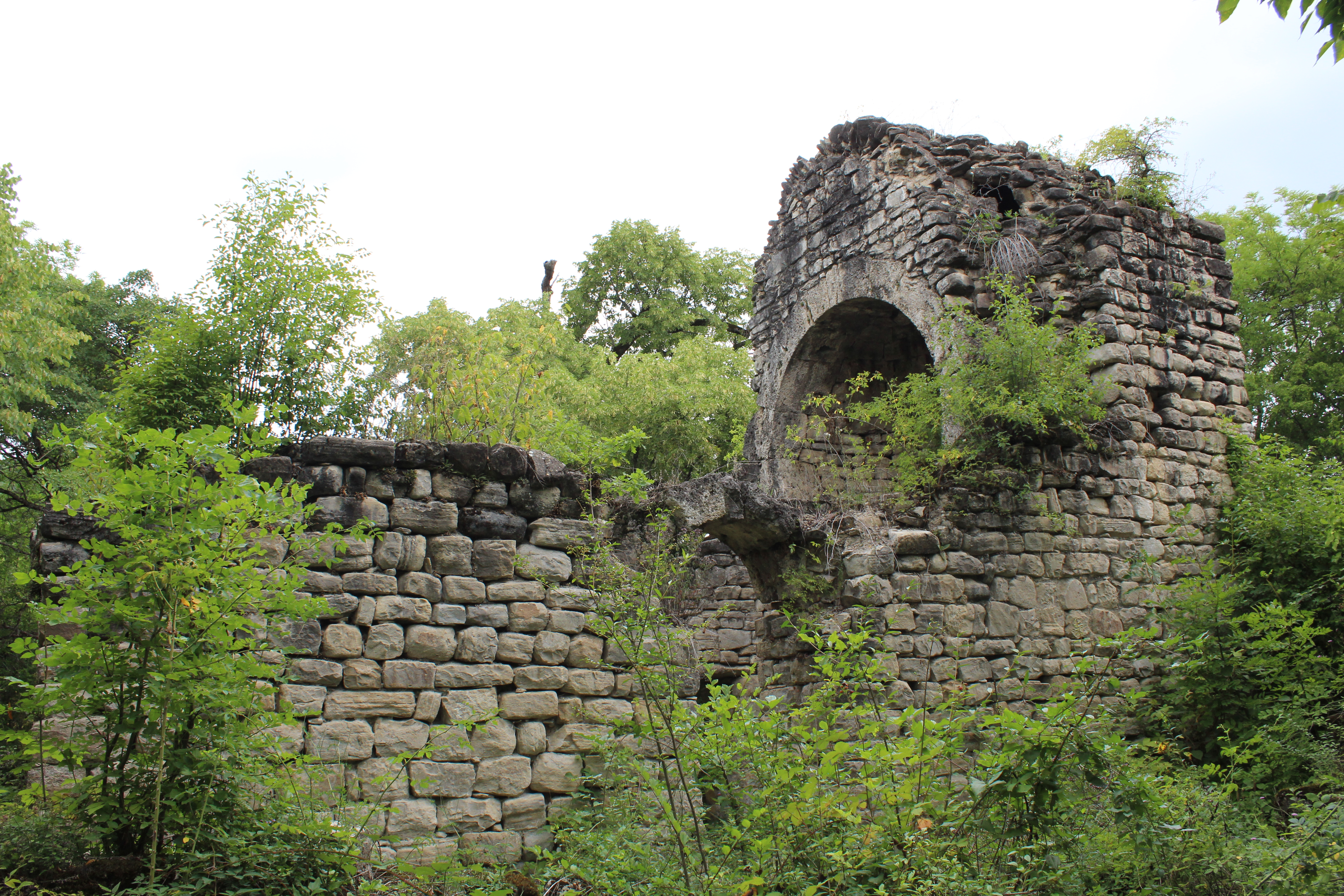 ჭერემის მამა დავითის ეკლესია